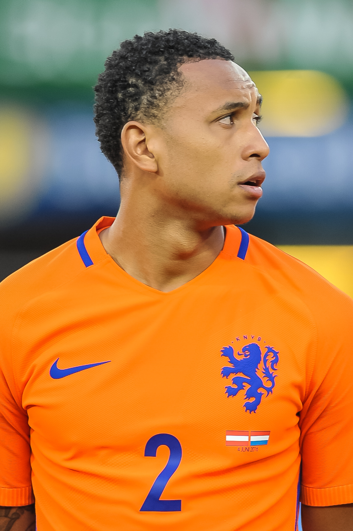 Wien, 4.6.2016, ÖFB Laenderspiel - Österreich vs Niederlande. Bild zeigt Kenny Tete (NED).